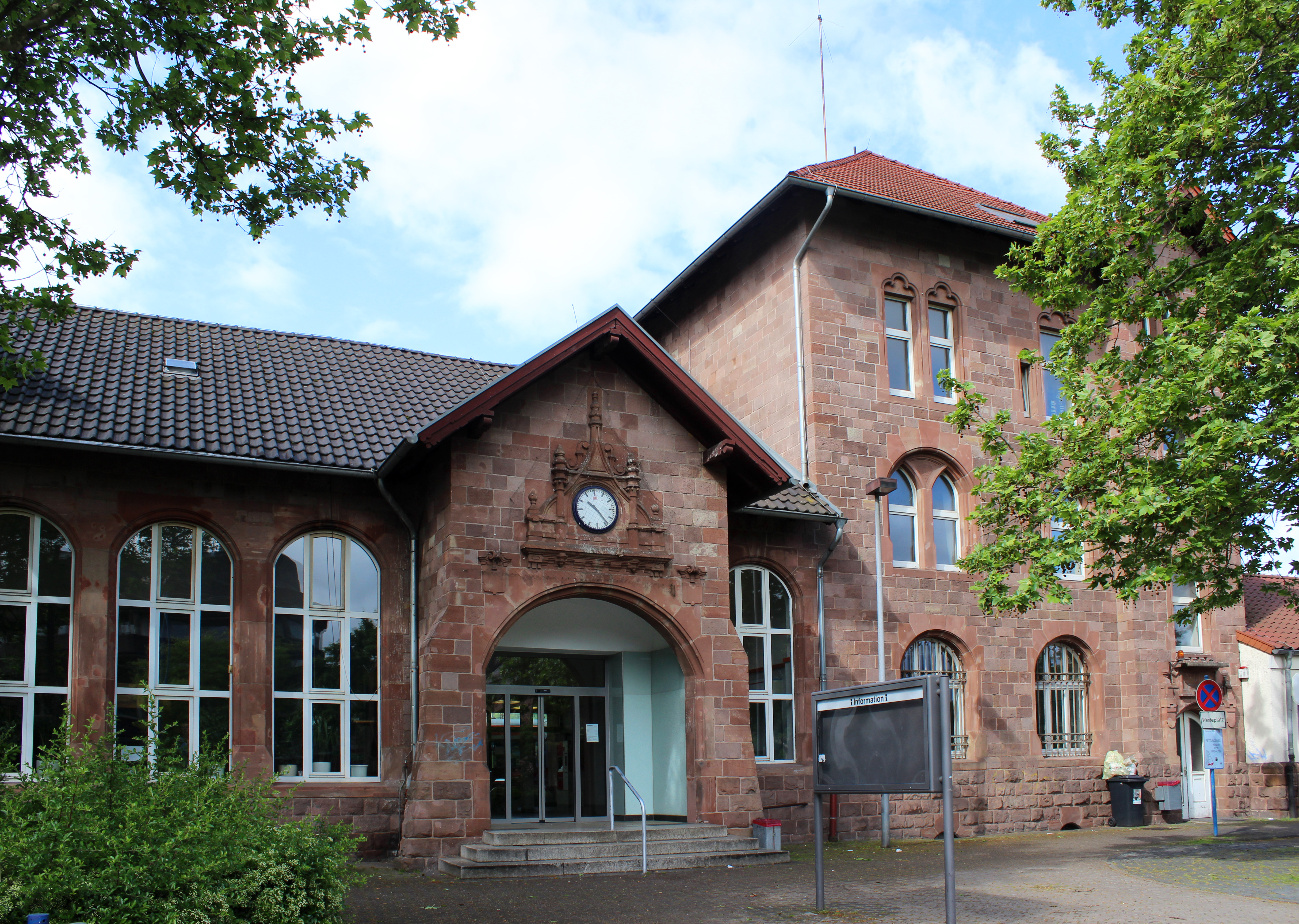 Dillingen, Landkreis Saarlouis, Saarland: Bahnhof Dillingen (Saar)